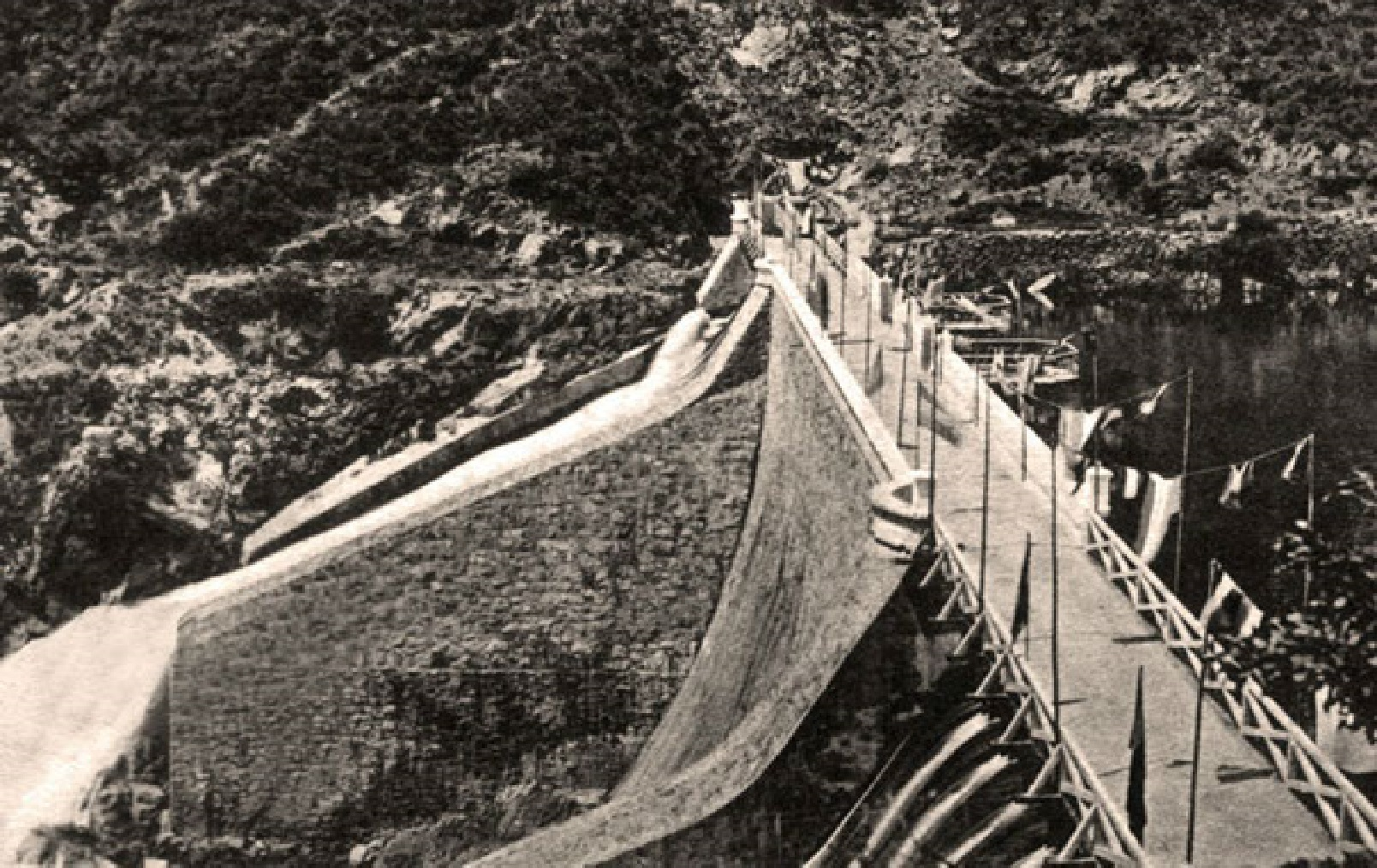 Antiguo Paredon Lago San Roque Hecho Por Carlos Cassaffousth